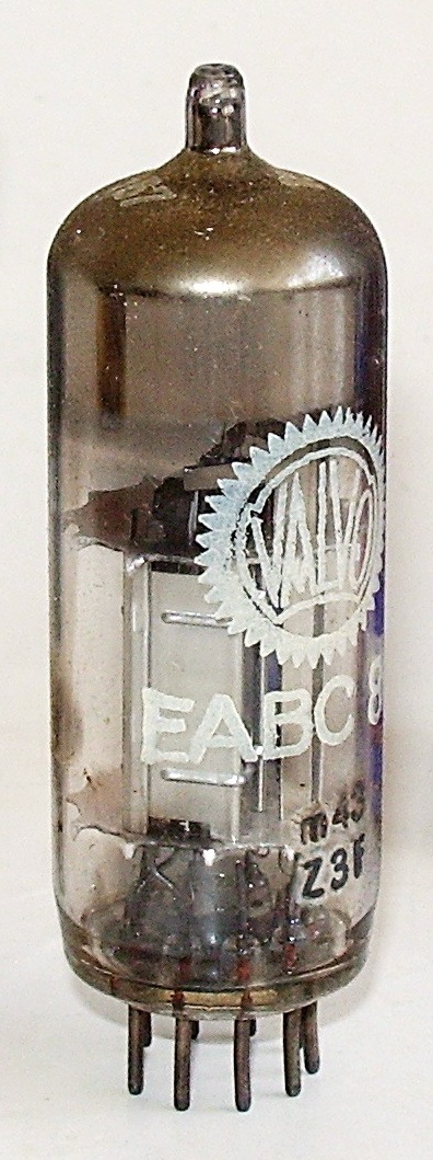 Radio vacuum tube EABC80